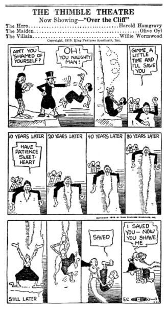 Page du Thimble Theater de Segar parue en décembre 1919.